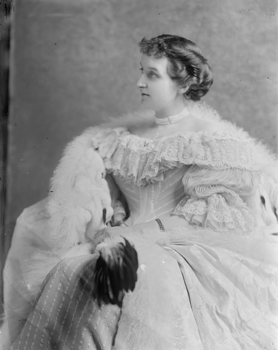 Madame Demachy au collier de perles